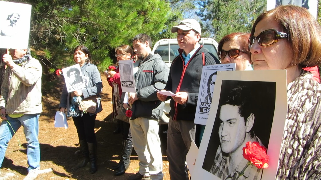 Integrantes de agrupaciones de detenidos desaparecidos y ejecutados políticos de Talca, Parral, Linares y San Javier en el homenaje organizado por la Asociación por la Memoria y los Derechos Humanos Colonia Dignidad en las fosas donde fueron inhumados y exhumados ilegalmente los cuerpos de los detenidos desaparecidos en Colonia Dignidad durante la dictadura de Augusto Pinochet en Chile.